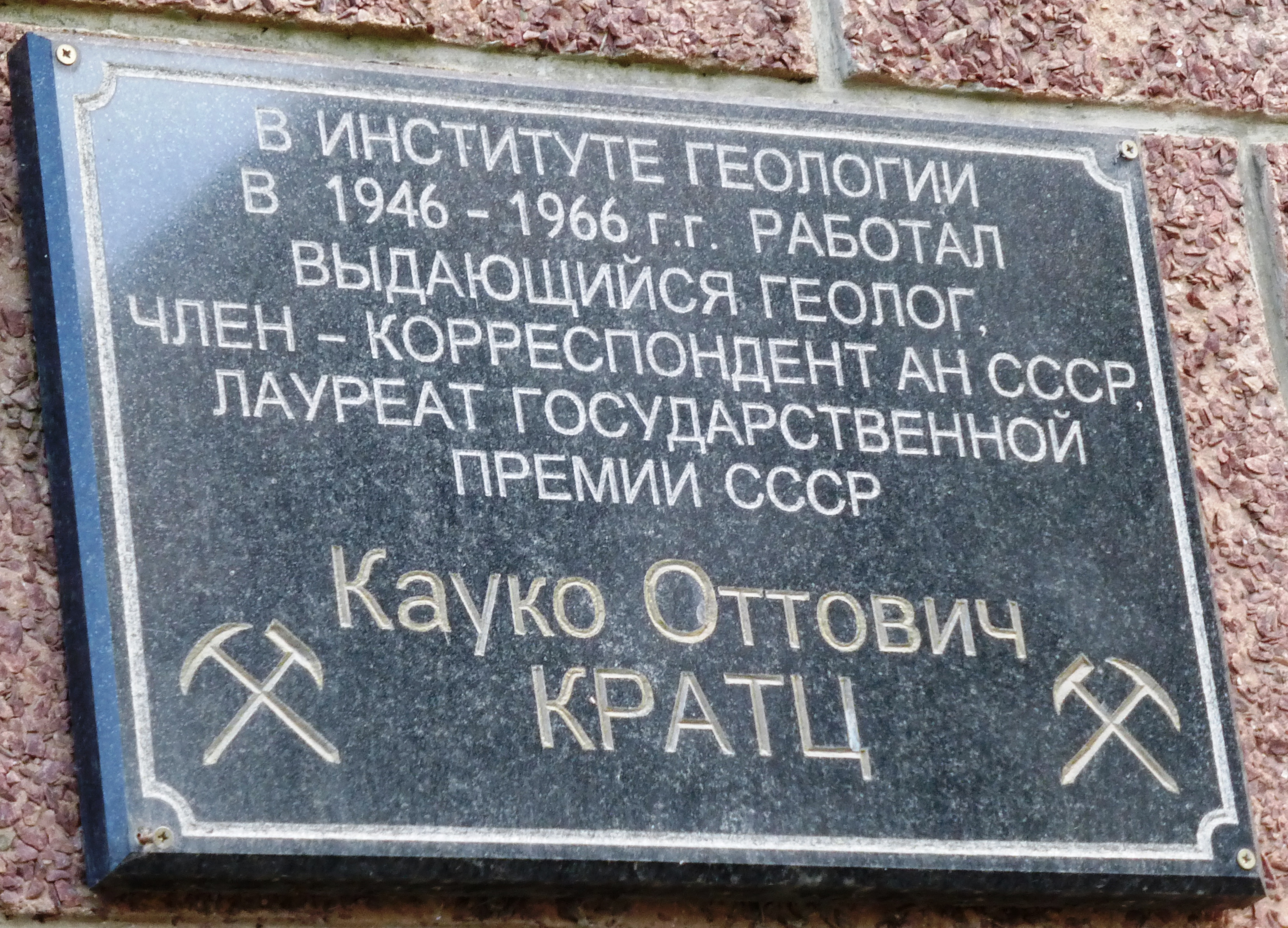 Мемориальная доска на здании Карельского научного центра РАН в Петрозаводске на ул.Пушкинской. Установлена в 2004 году